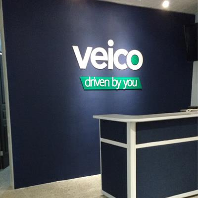 Mostrador de arrendadora local en Guadalajara, México.